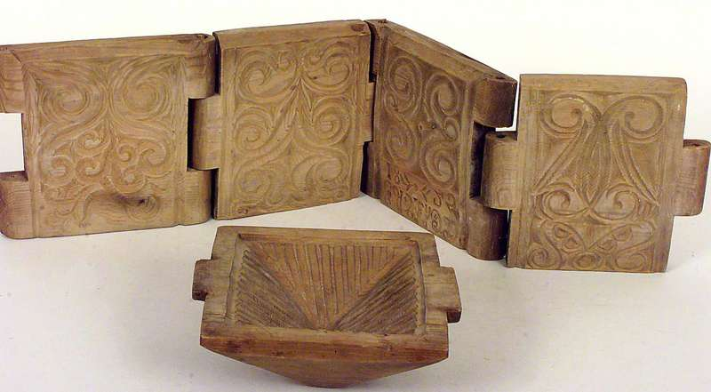 Smørform fra Meråker i Nord-Trøndelag., skåret i tre med datering 1825 og initialene EAS og IACD. Foto: Anne-Lise Reinsfelt / Norsk Folkemuseum, NF.1987-0695.